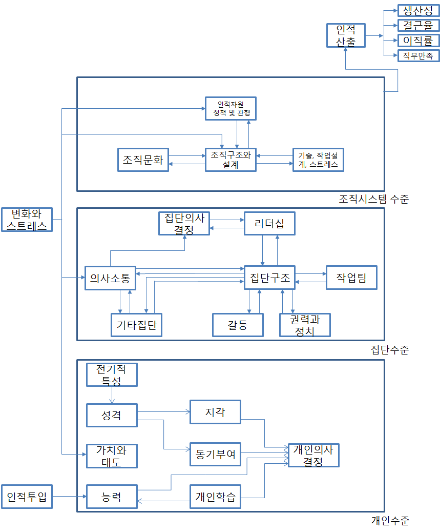 조직행동기본모델